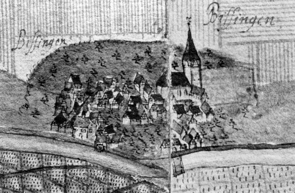 Bissingen an der Enz auf der Kieserschen Forstkarte von 1682/84